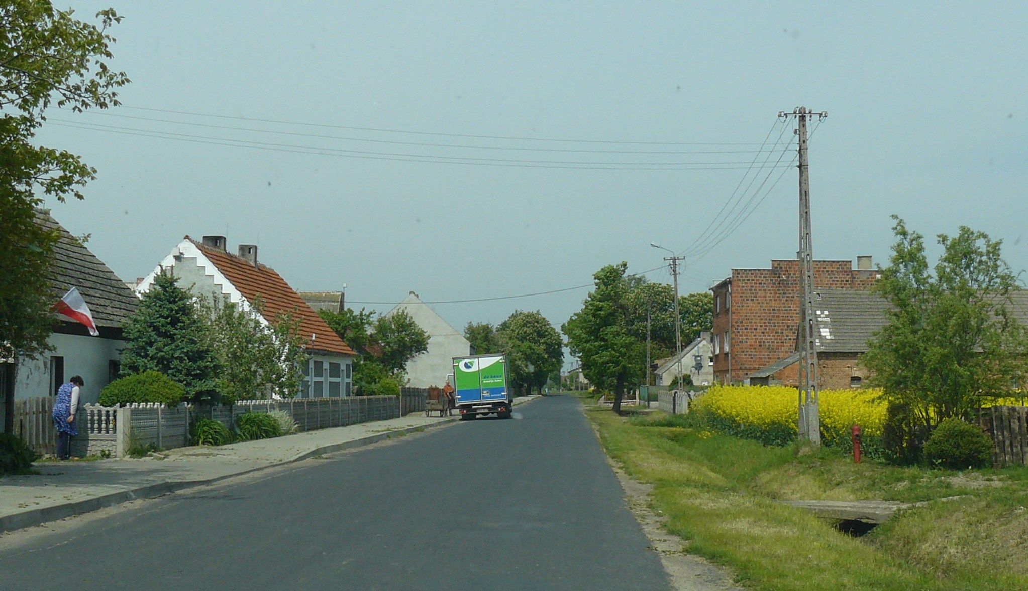 Nowa Obra.